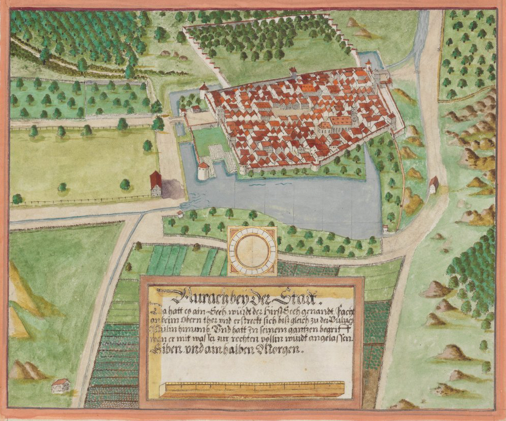 Seehbuch, darinnen alle Seeh und Weyher in dem löplichen Hertzogthumb Würtemberg. Stuttgart (?), Anfang 17. Jh.; Württembergische Landesbibliothek Stuttgart, Cod. hist. fol. 261, fol. 18r, Detail: Urach